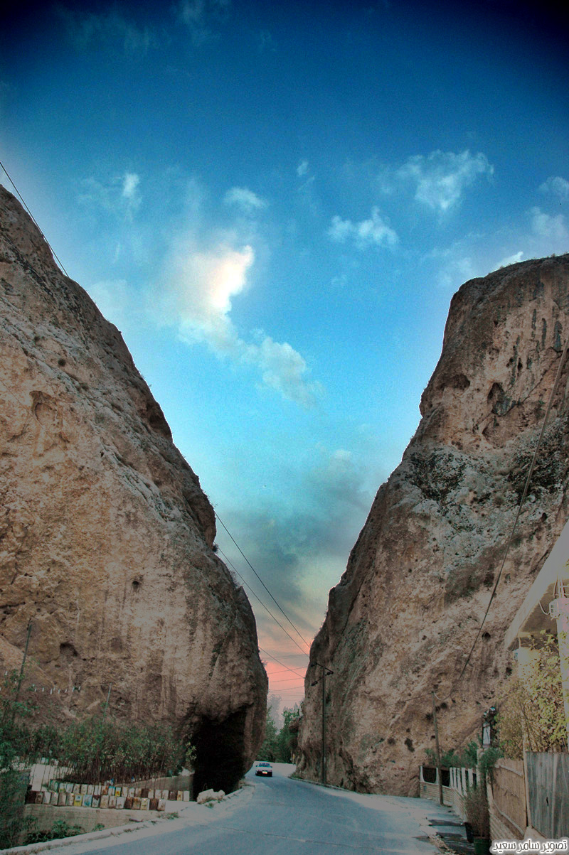 مدخل حلبون